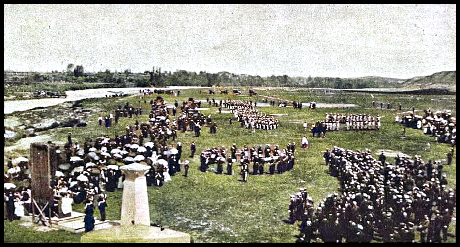 Fotografía de la misa de campaña en memoria del Alférez Don Jorge Porrúa.